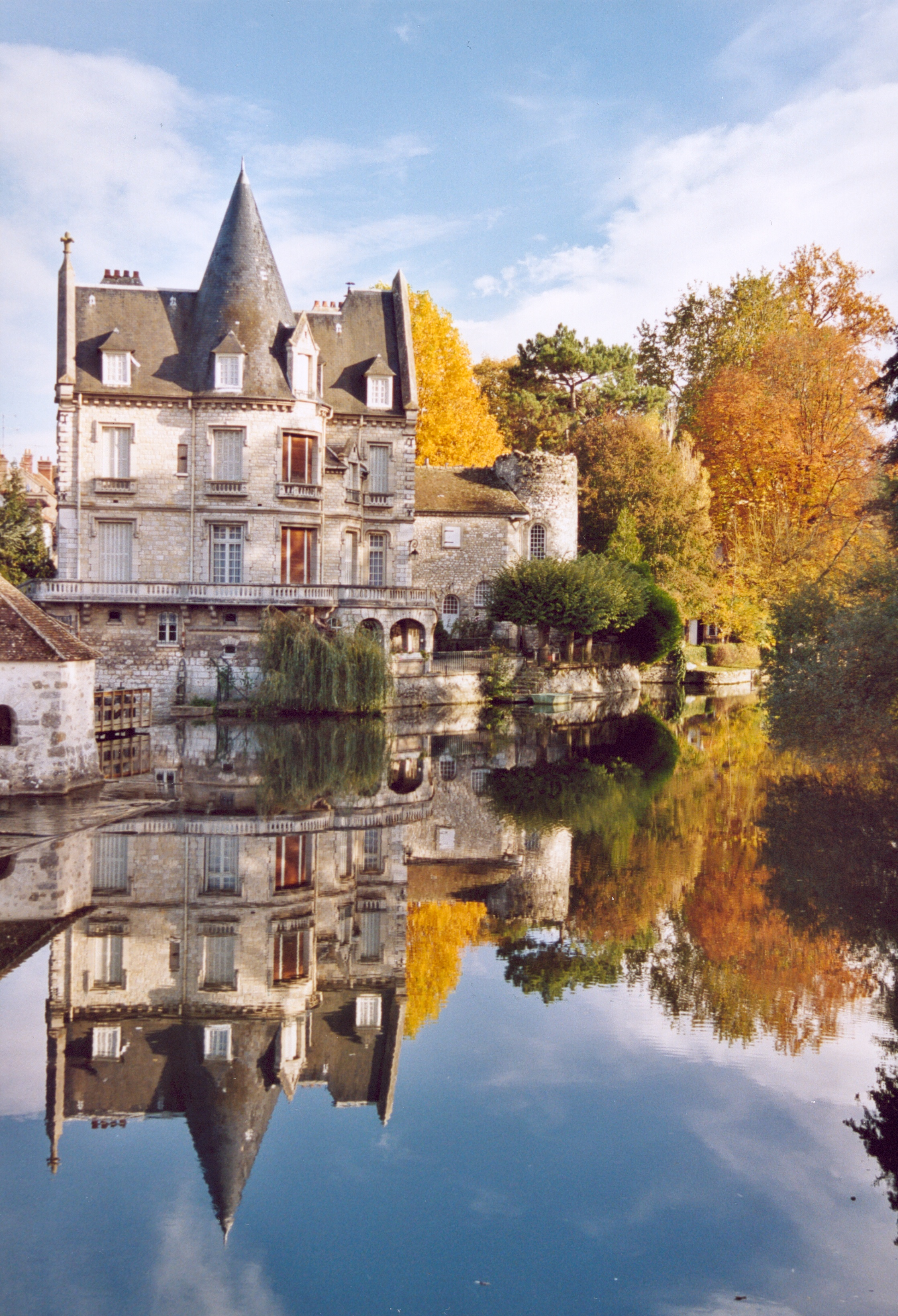 France Seine-et-Marne Moret-sur-LoingSeine-et-Marne